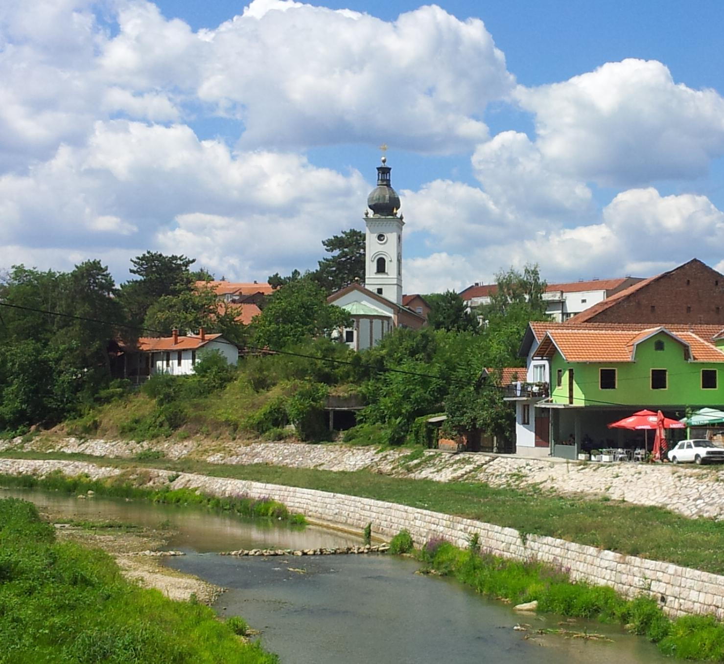 Crkva Sv. Đorđa u Knjaževcu